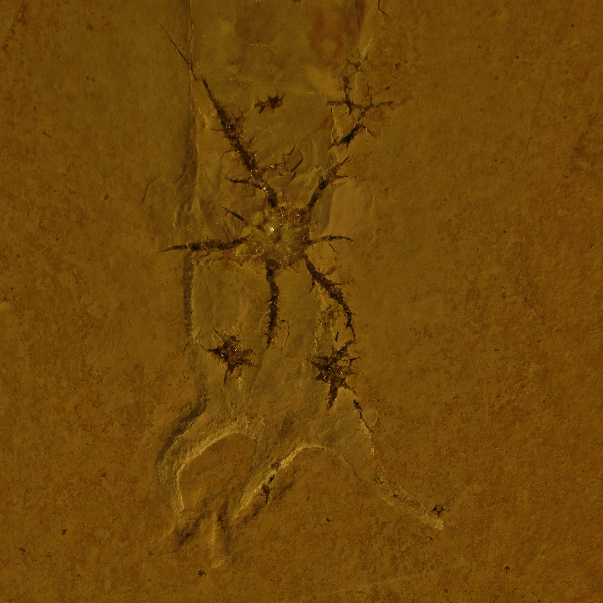 Fossil of Plesioteuthis- Took the picture at Natural History Museum, Bonn University